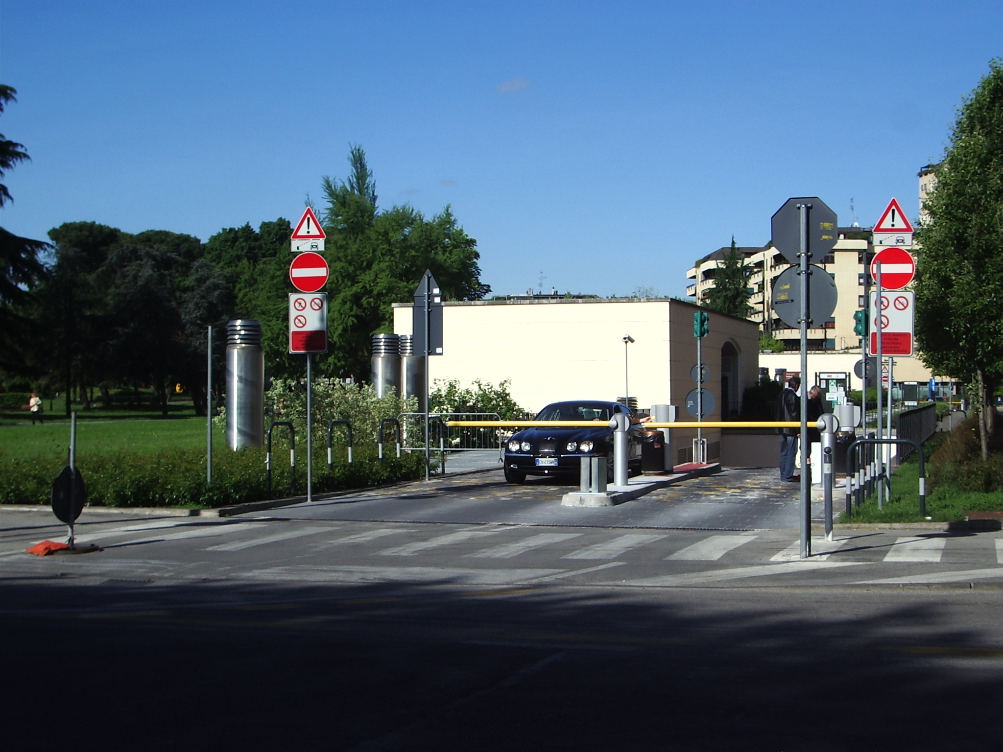 Uscita parcheggio multipiano Verdi - Vicenza